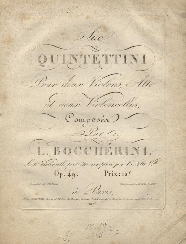 Six Quintettini Pour deux Violons, Alto et deux Violoncelles de Boccherini publiés par Pleyel.